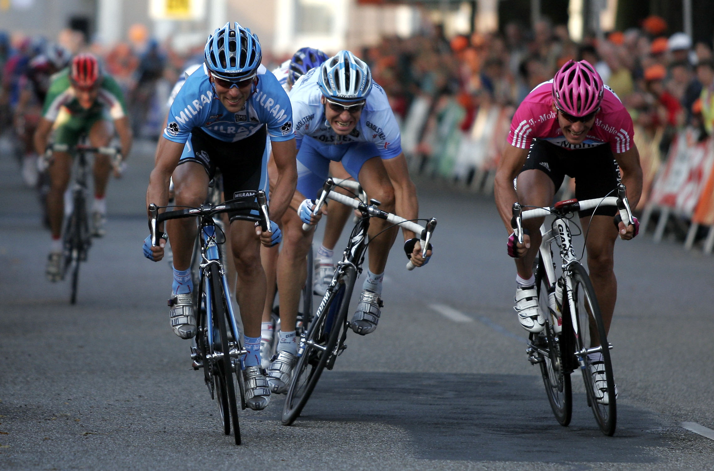 Sprintentscheidung beim Entega Grand Prix 2007 in Lorsch (Südhessen)